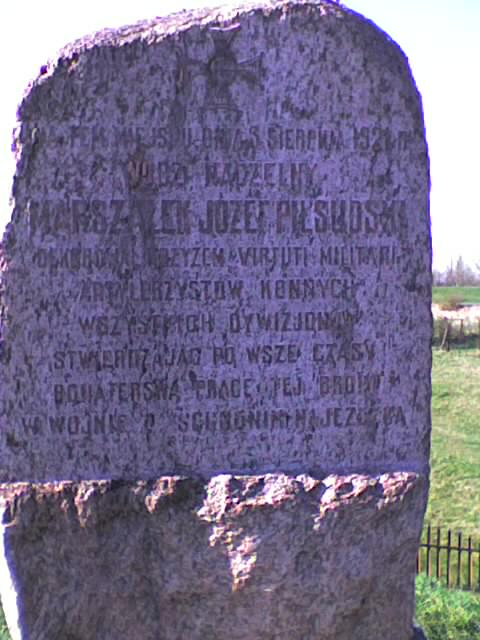 "W TEM MIEJSCU DNIA 3 SIERPNIA 1921R WÓDZ NACZELNY MARSZAŁEK JÓZEF PIŁSUDSKI UDEKOROWAŁ KRZYŻEM 'VIRTUTI MILITARI' ARTYLERZYSTÓW KONNYCH WSZYSTKICH DYWIZJONÓW STWIERDZAJĄC PO WSZE CZASY BOHATERSKĄ PRACĘ TEJ BRONI W WOJNIE ZE WSCHODNIM NAJEŹDŹCĄ"